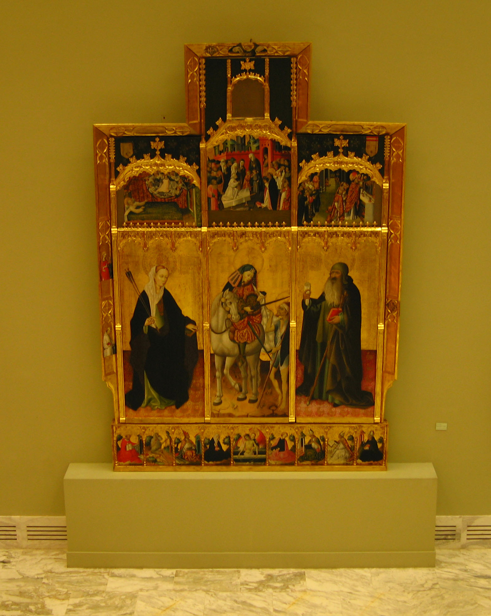 Esta obra, llamada el Retablo de San Martín, Santa Úrsula y San Antonio Abad, procede de la Cartuja de Porta Coeli y debió ser realizada aproximadamente entre 1437 y 1440.